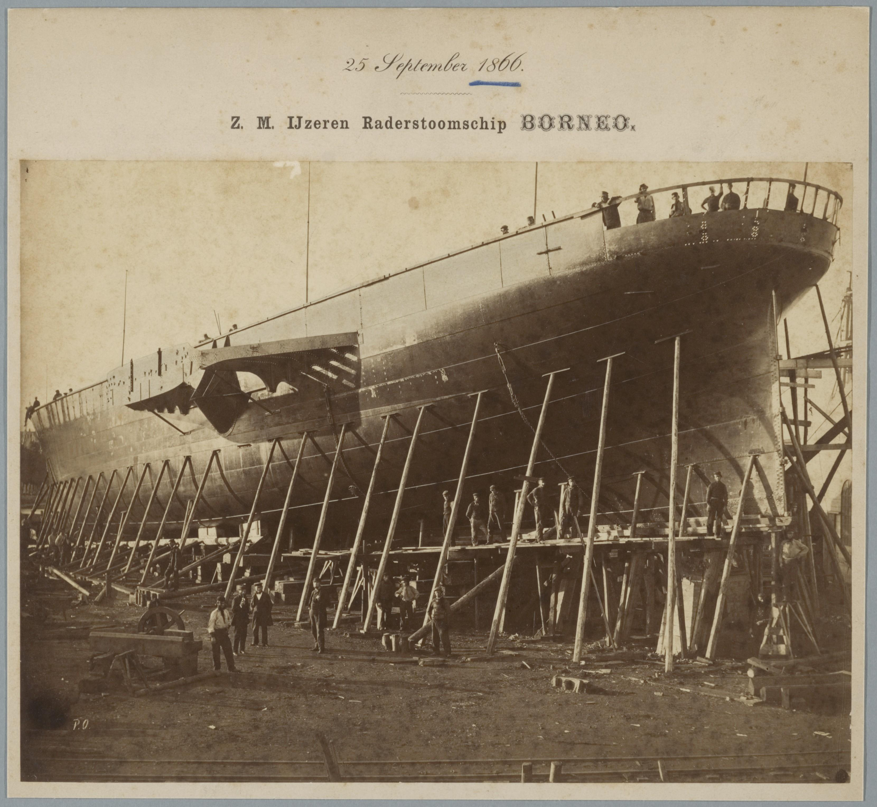 Beschrijving Het ijzeren raderstoomschip 'Borneo', tijdens de bouw op de werf van de Koninklijke Fabriek van Stoom- en Andere Werktuigen, firma Paul van Vlissingen en Dudok van Heel, aan de Oostenburgervaart Het schip werd gebouwd voor de dienst in Nederlands-Indië, ten behoeve van het Departement van Koloniën, overeenkomstig plannen van de heren Huygens en Turk. Documenttype foto Vervaardiger Oosterhuis, Pieter Collectie Collectie Stadsarchief Amsterdam: foto-afdrukken Datering 25 september 1866 Inventarissen Afbeeldingsbestand ANWF00615000001 Generated with Dememorixer